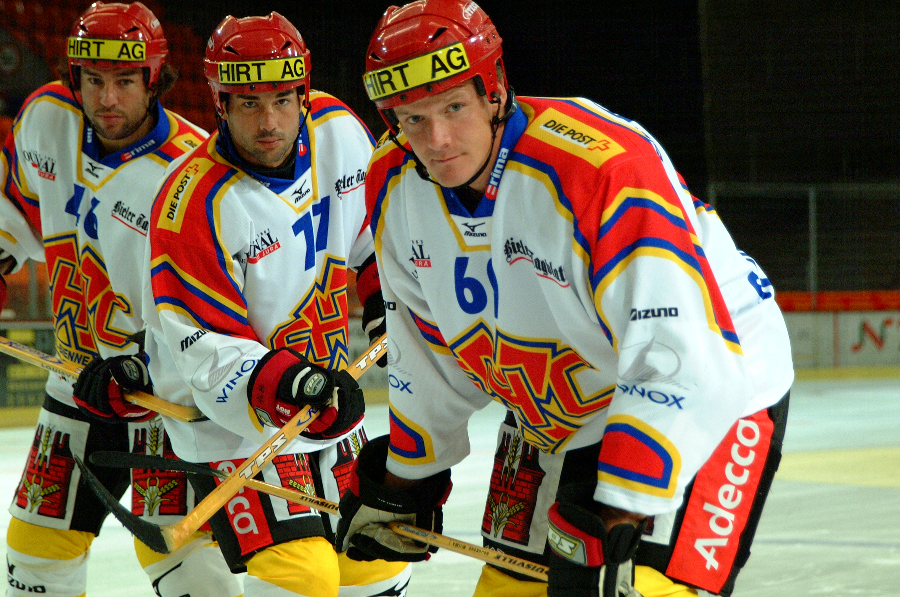 EHC-Biel-Spieler in der Saison 2004/05 links: Jean-François Jomphe; Mitte: Chris Belanger; rechts: Kevin Schläpfer